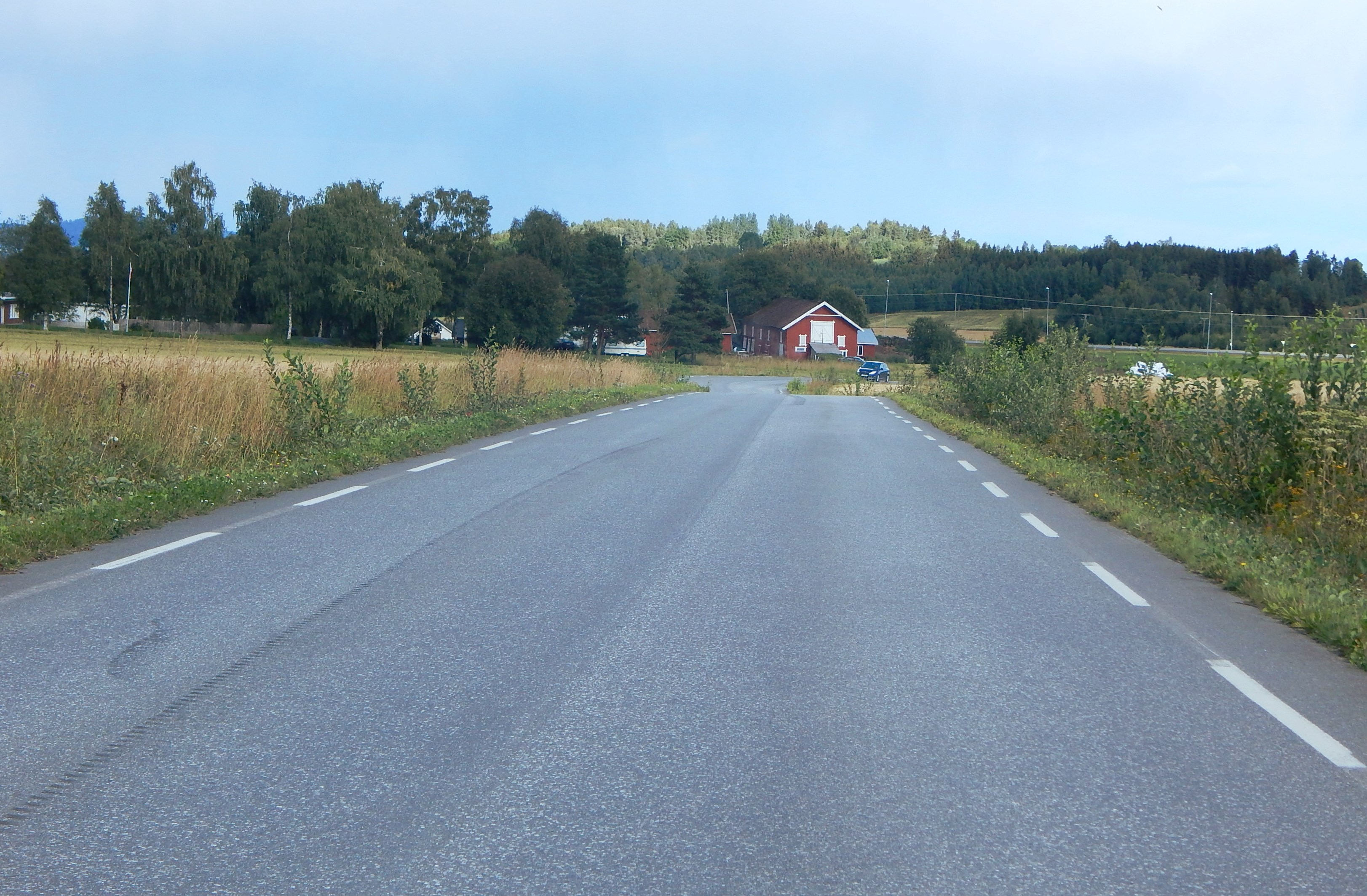 Gilemarkvegen (fylkesvei 2360, tidl. 88)